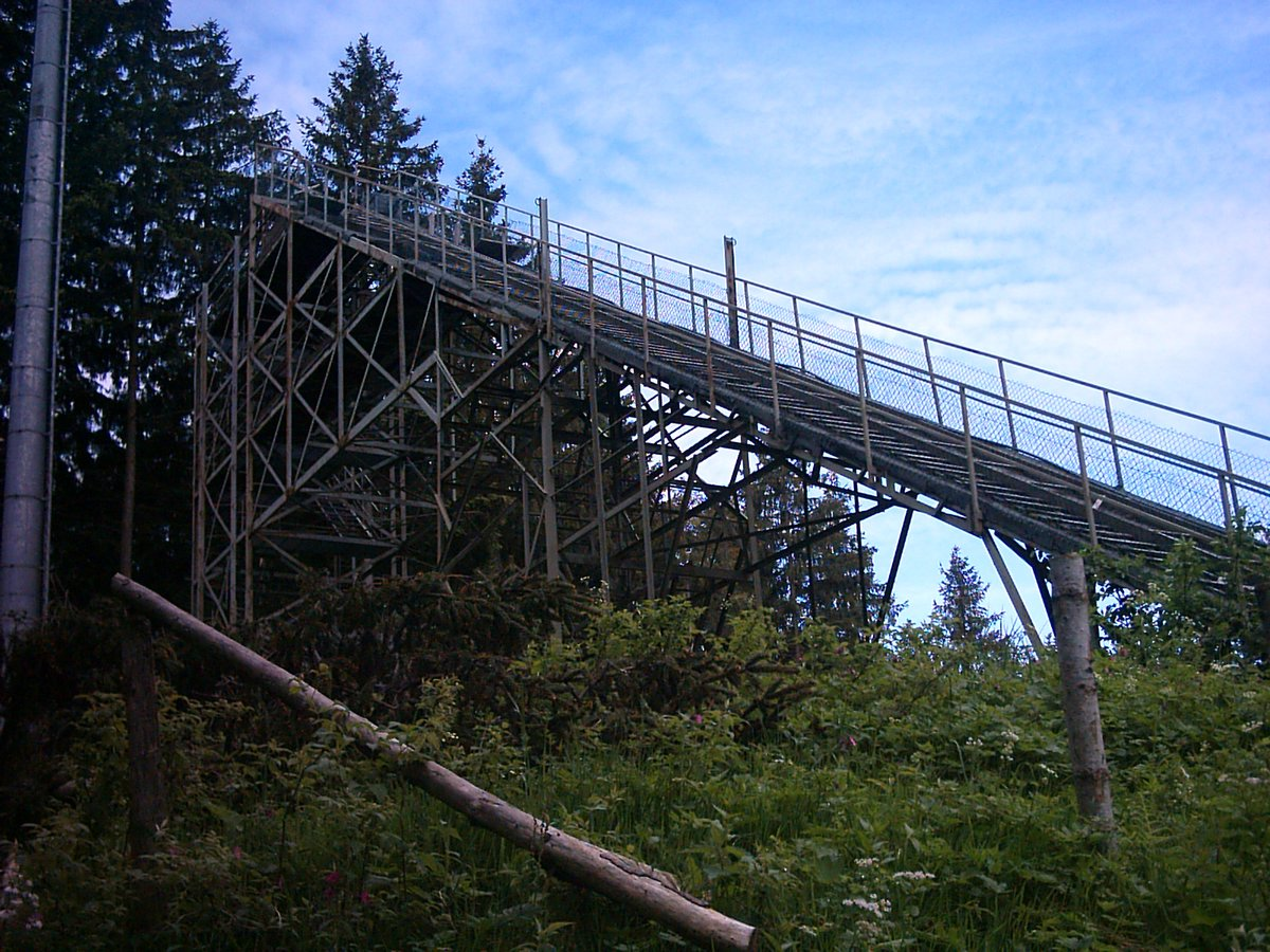 close up of Felsenschanze Ski Jumping Tower in Scheidegg / Allgäu (Germany)